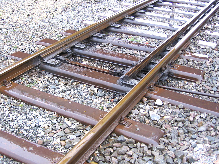 steel sleepers in Zábřeh na Moravě - Czech republic